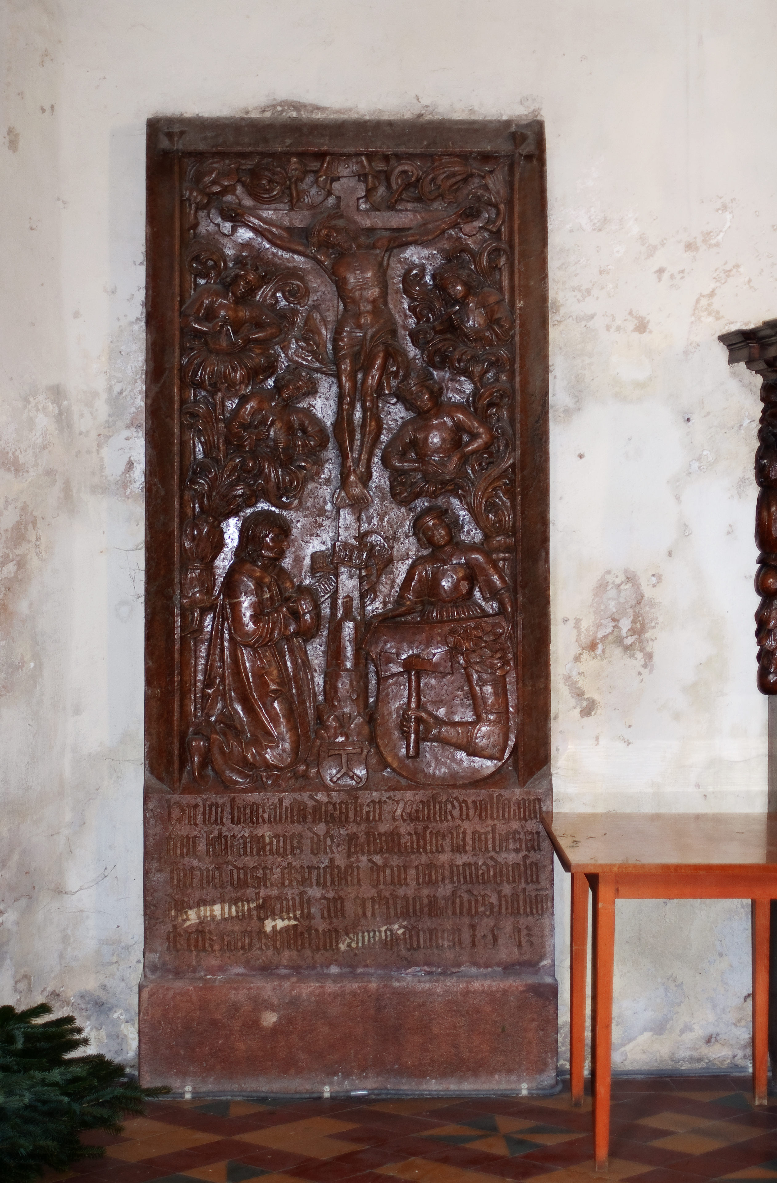 Der Epitaph des Baumeisters Wolfgang Tenk in der Steyrer Stadtpfarrkirche